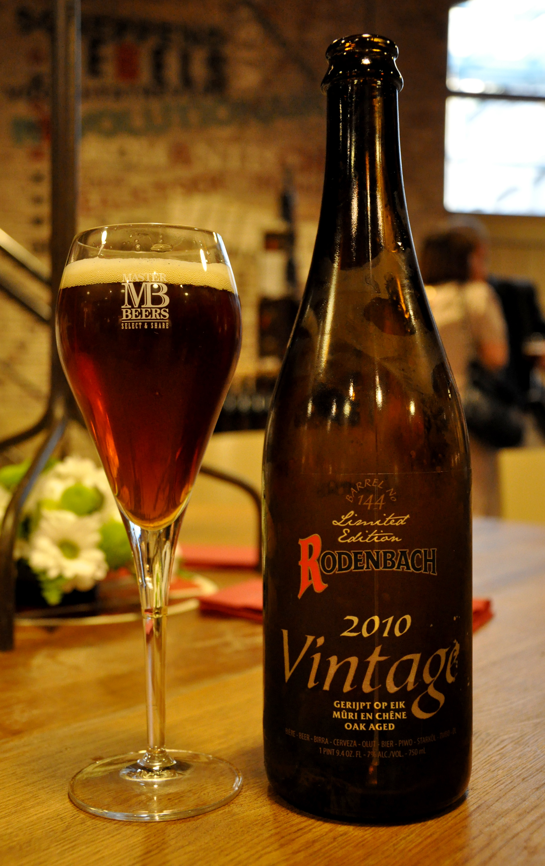 Rodenbach Vintage 2010